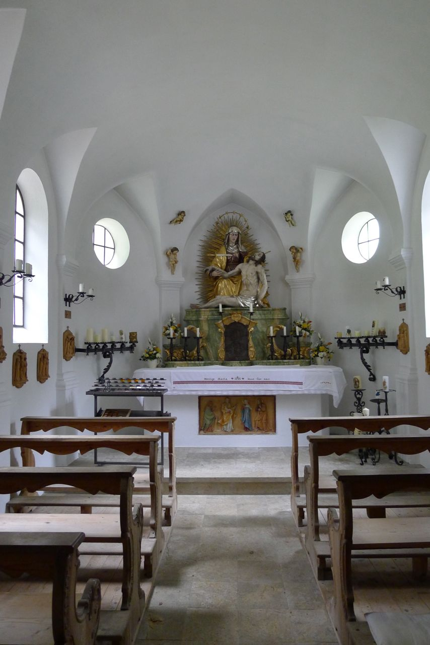 Altar der Wallfahrtskapelle Nüchternbrunn